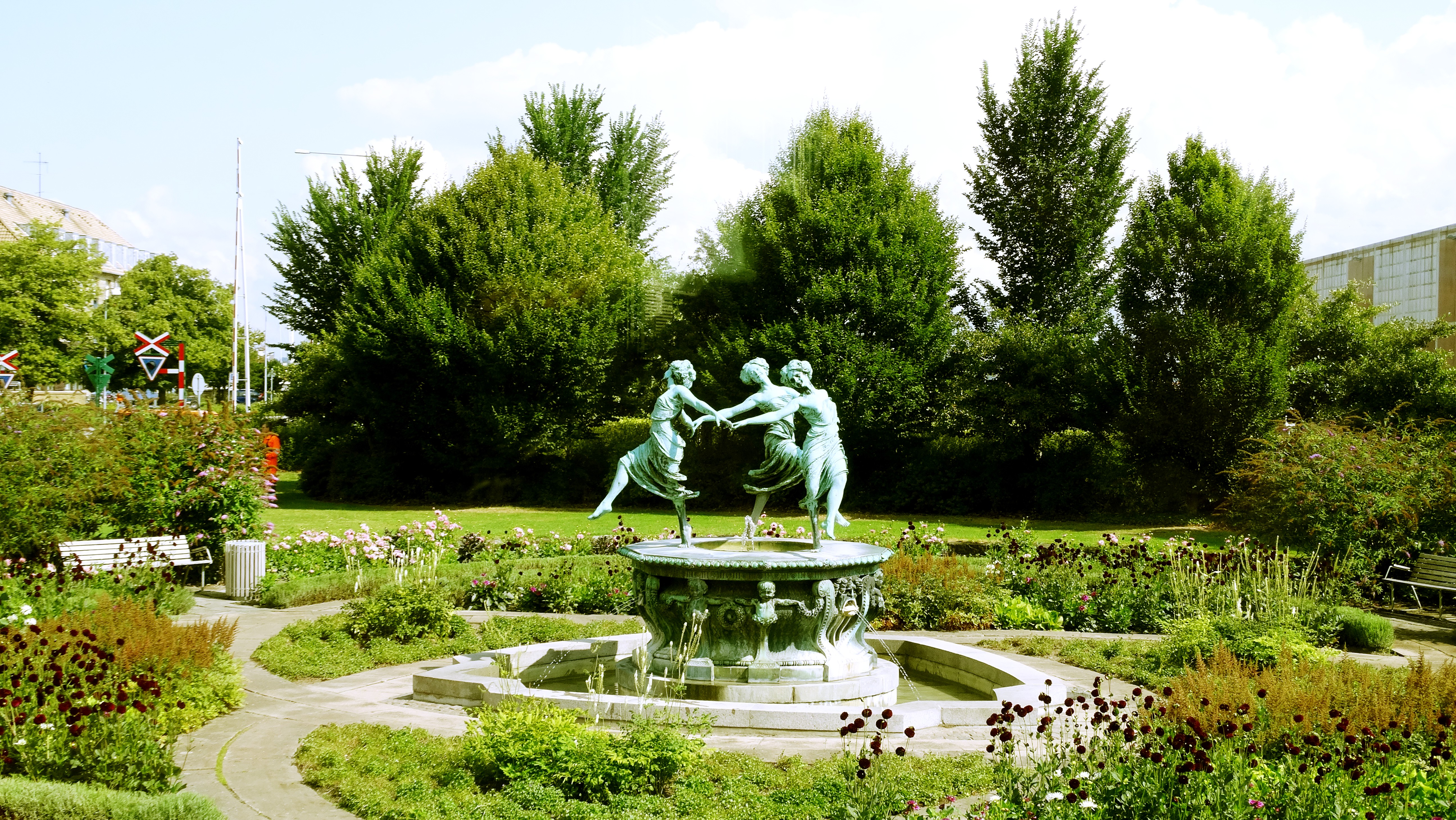 Denmark - Kronborg, Hamlet Castle